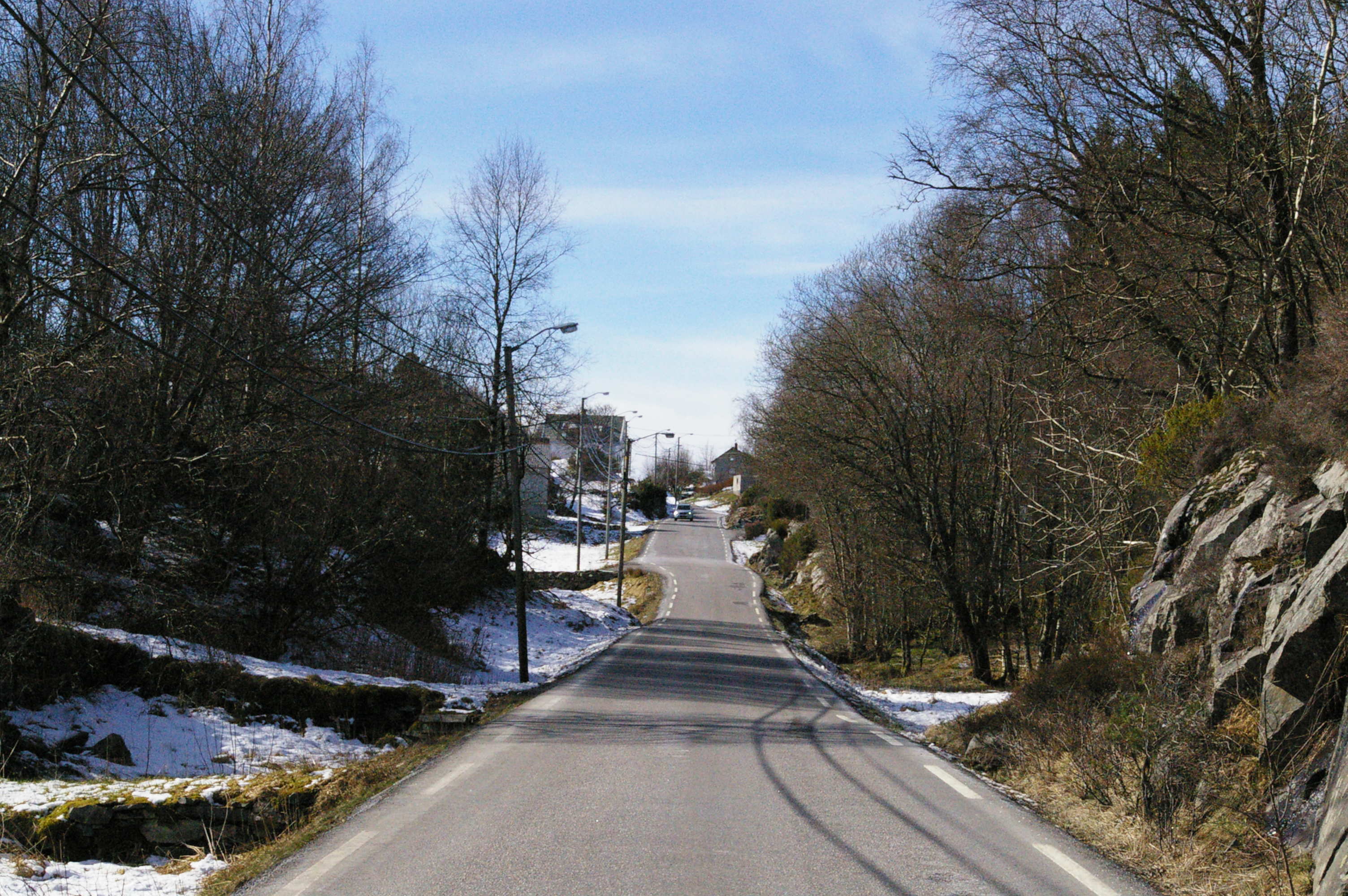 Fylkesveg 220 i Hordaland mot Davanger på Askøy